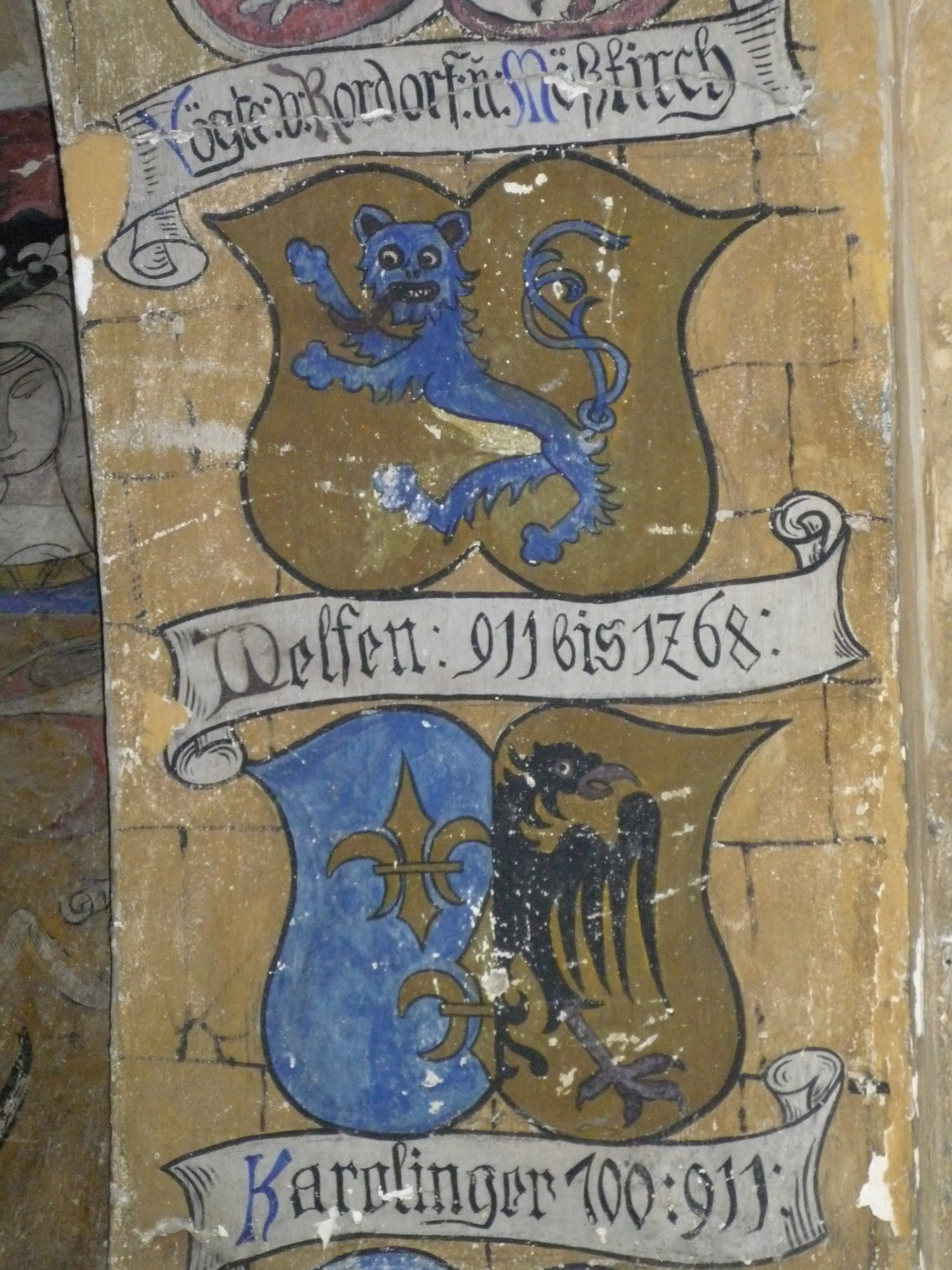 Wappen an der Burg Meersburg: Vögte von Rordorf und Meßkirch Welfen 911-1268 Karolinger 100-911